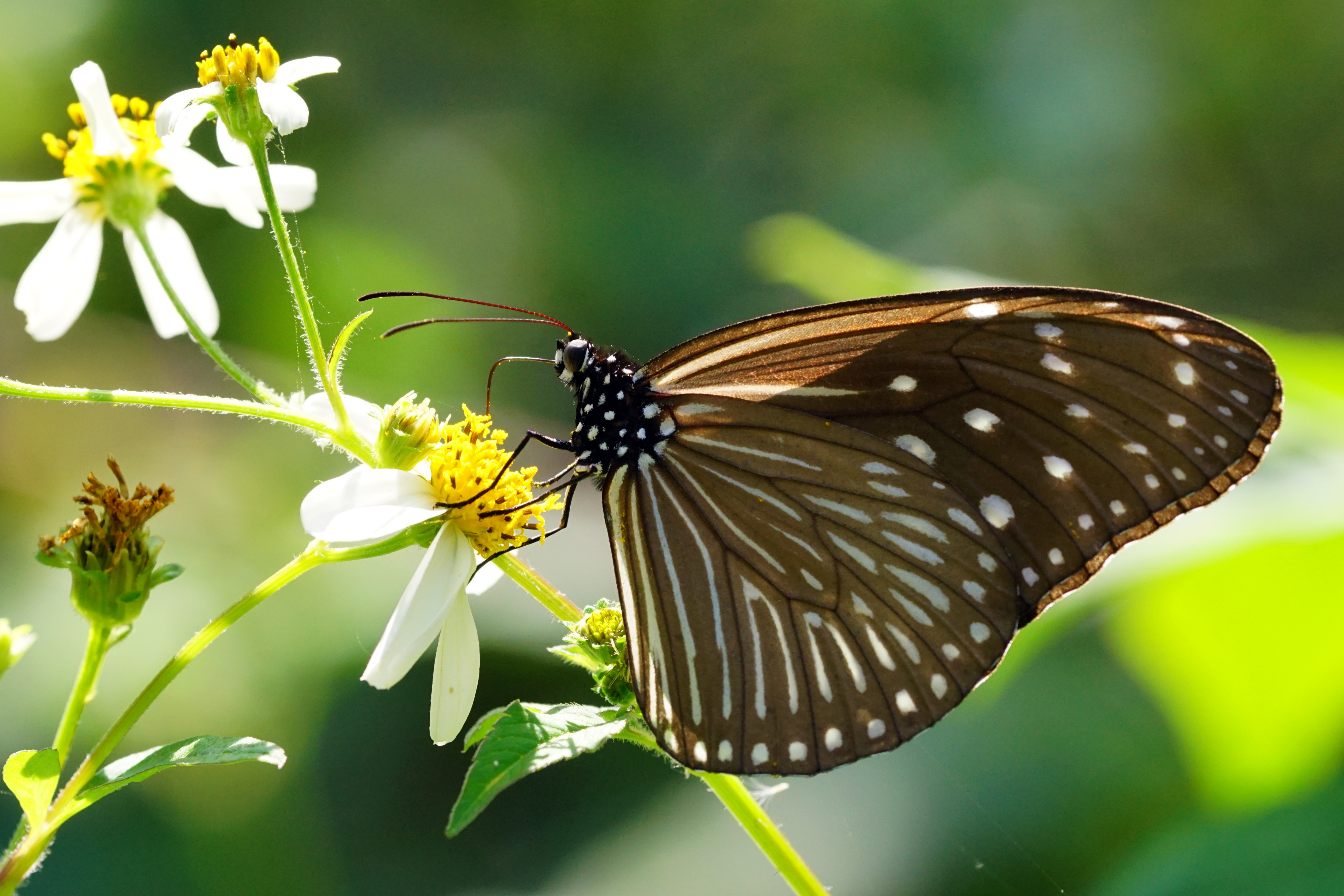 異紋紫斑蝶 Euploea mulciber barsine